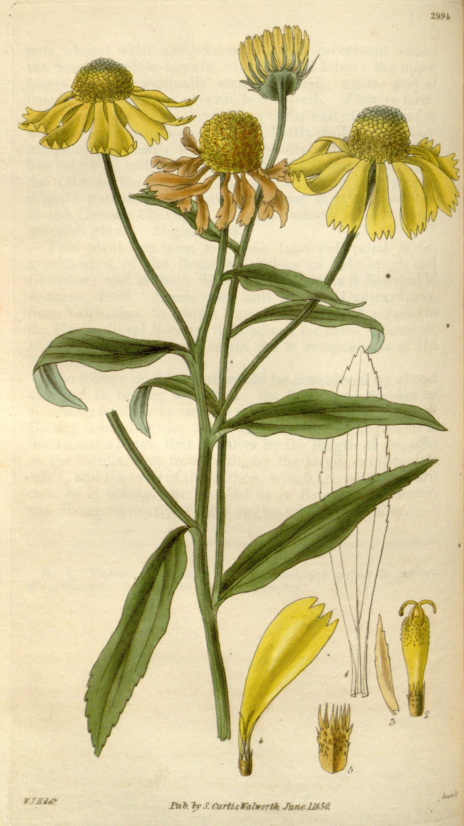 Helenium autumnale